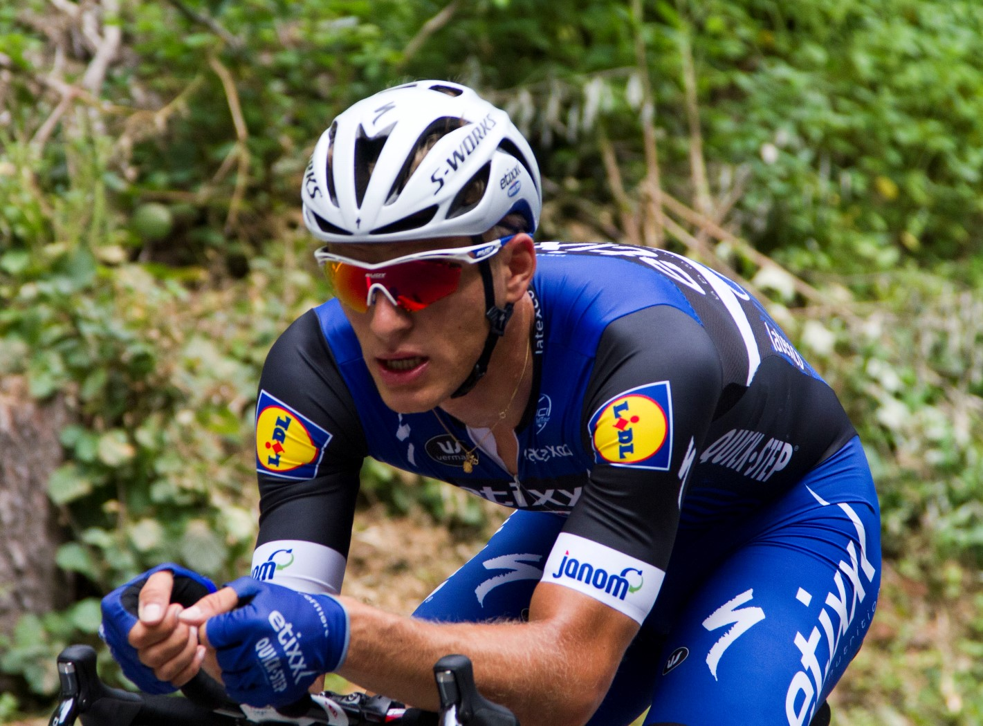 381 kittel